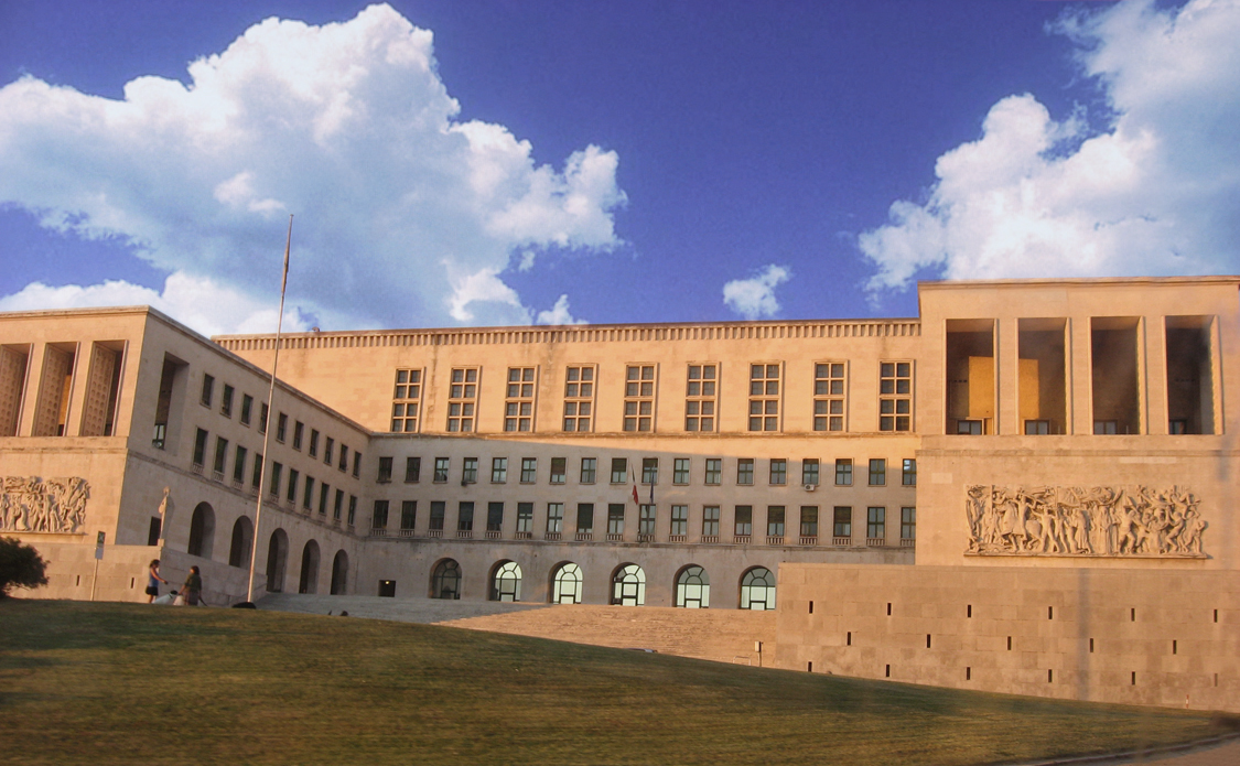 Trieszti egyetem.